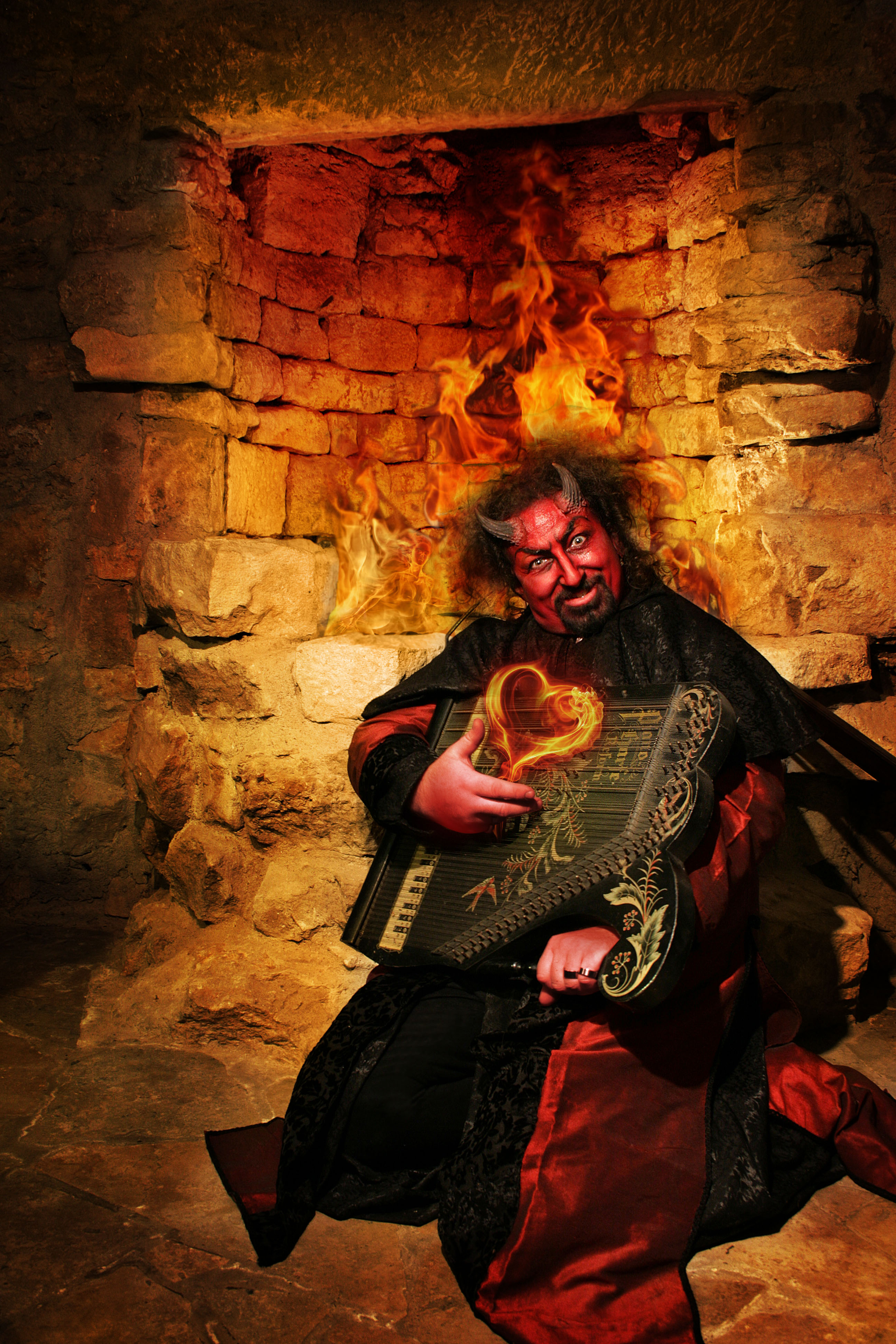 Düvel vom Dom